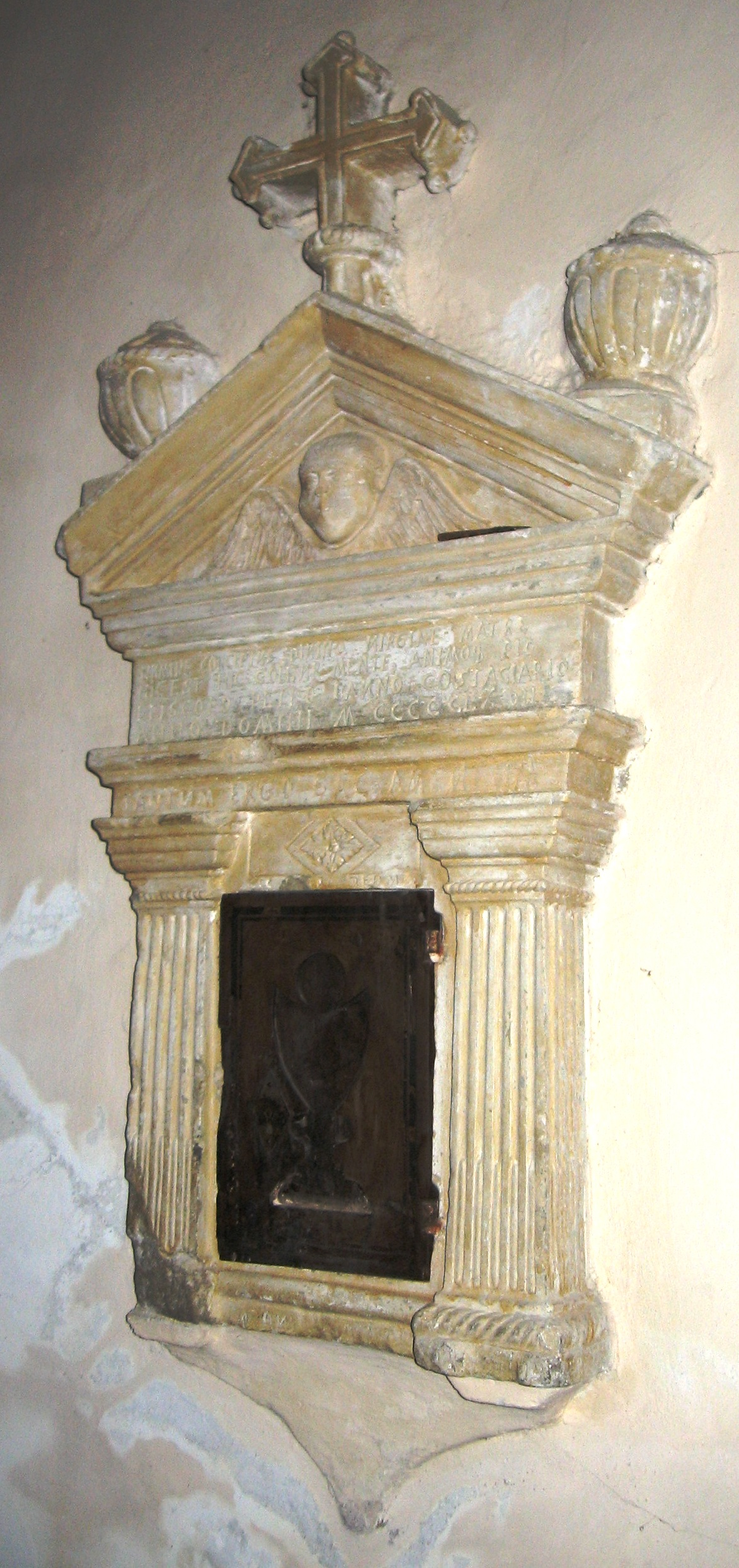 Pezzolo Valle Uzzone . Gorrino. Parrocchiale di san Pietro. Parete di ds dell'abside. Ciborio in pietra, con data del luglio 1560 e il riferimento al Vescovo Pietro Fauni di Costacciaro, vescovo di Acqui dal 1558 al 1585.